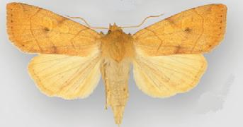 Enargia paleacea female